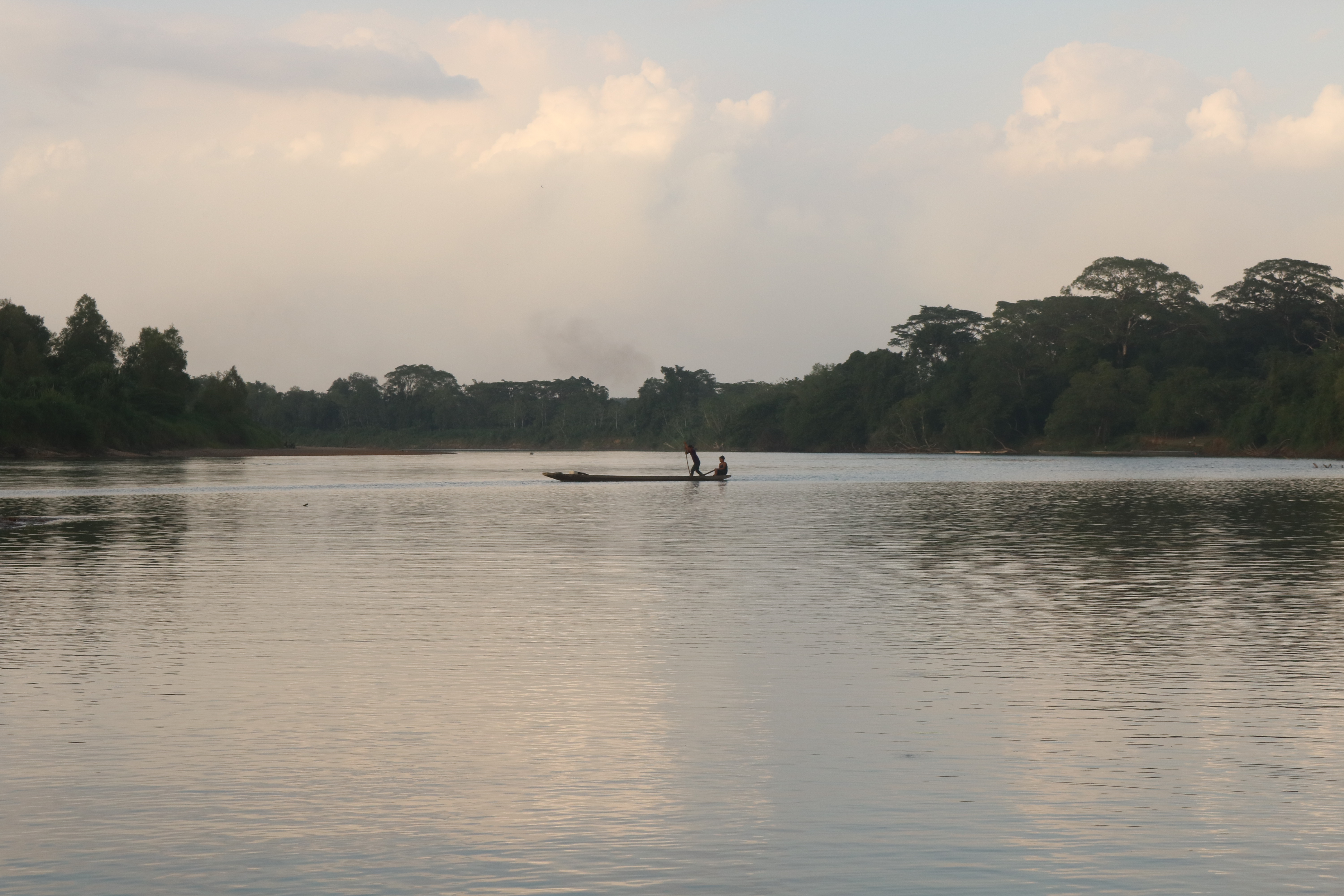 Panorámica del Río Patuca, municipio de Wampusirpi, departamento de Gracias a Dios, concejo territorial indígena de BAKINASTA, zona cultural de la RHBRP This is an image of the Biosphere Reserve or a Geopark: Río Plátano Biosphere Reserve